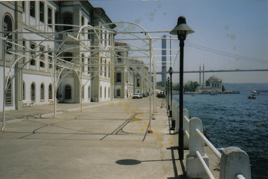 Bunu da ben çektim Davut denKEL